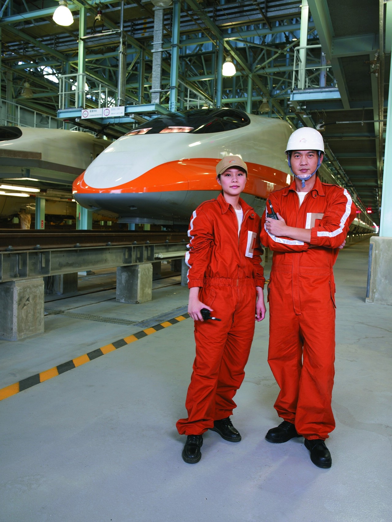 中文（台灣）: 台灣高鐵燕巢總機廠的技術人員2人。